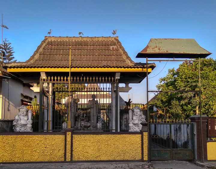 Museum Padepokan Sumber Karahayon adalah museum yang terletak di Dusun Tegal, Kelurahan Jambidan, Kecamatan Banguntapan, Kabupaten Bantul, Provinsi Daerah Istimewa Yogyakarta. Pada awalnya, museum tersebut merupakan tempat tinggal dari Ki Wiryodikarso (lebih dikenal dengan nama Mbah Pleret) sebelum ditetapkan menjadi salah satu museum di Kabupaten Bantul oleh Dinas Kebudayaan Kabupaten Bantul. Dia adalah salah satu pejuang nasional dan pendiri awal Yayasan Hondodento. Koleksi yang ada di museum ini adalah benda-benda bersejarah miliknya berupa patung, foto, mobil, pakaian, dan lain-lain. Adapun para anggota dari Yayasan Hondodento sendiri biasanya ikut serta dalam upacara labuhan di Pantai Parangkusumo dengan melarung sesajen. Ritual tersebut merupakan wujud rasa syukur para anggotanya yang rutin diadakan setiap tanggal 15 Sura.